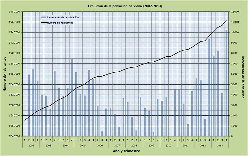 Evolución de la población de Viena en el periodo 2002-2013. Número total de habitantes e incrementos trimestrales.